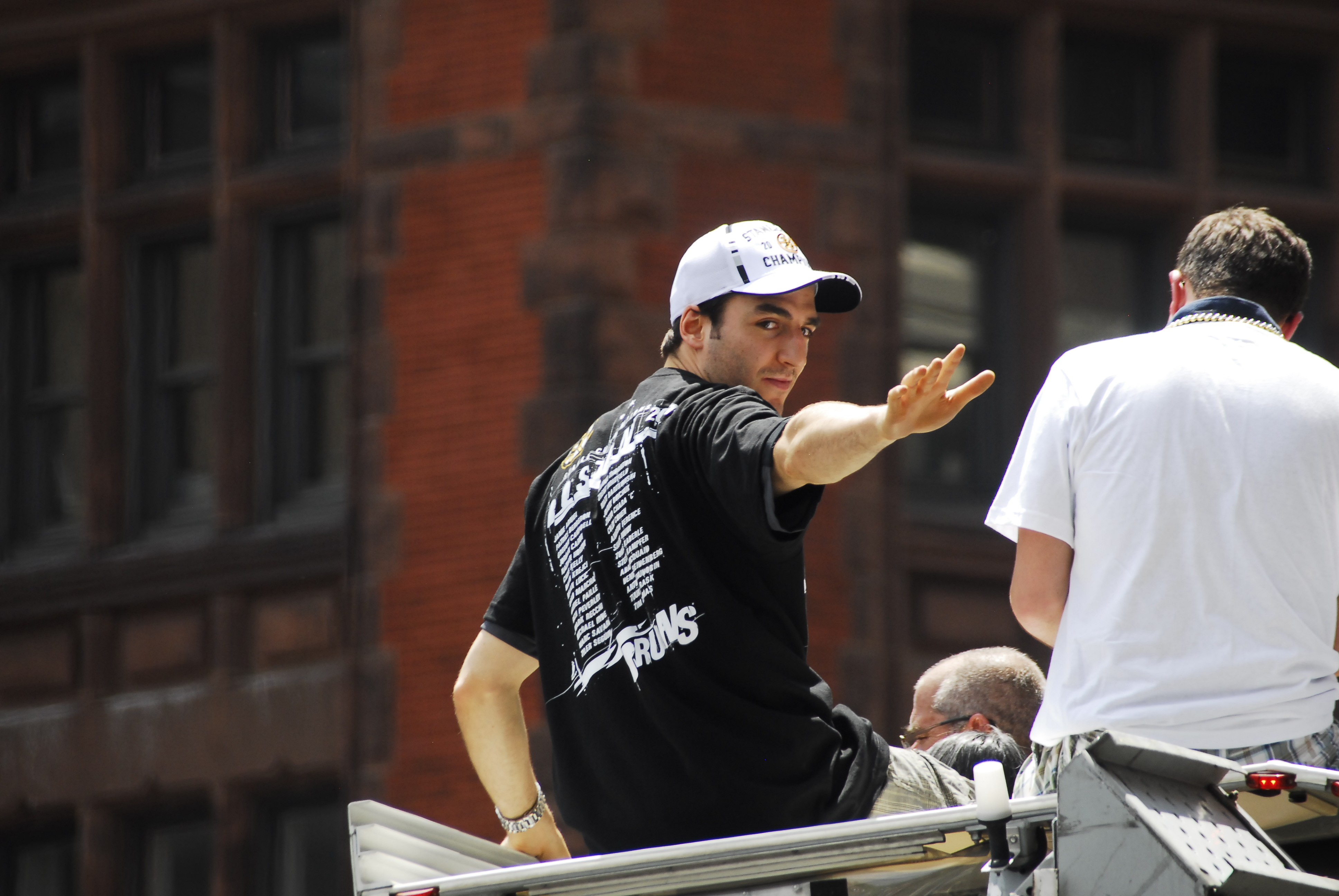 _ERI6516